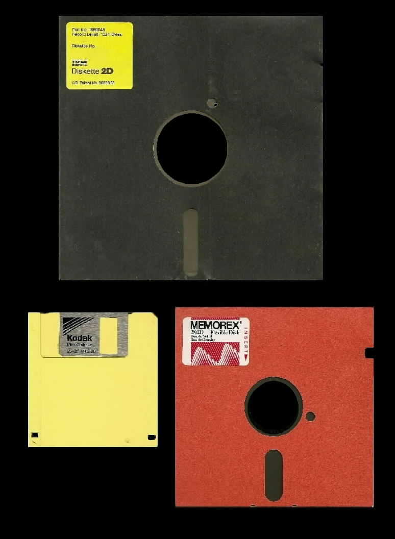 Diskettes